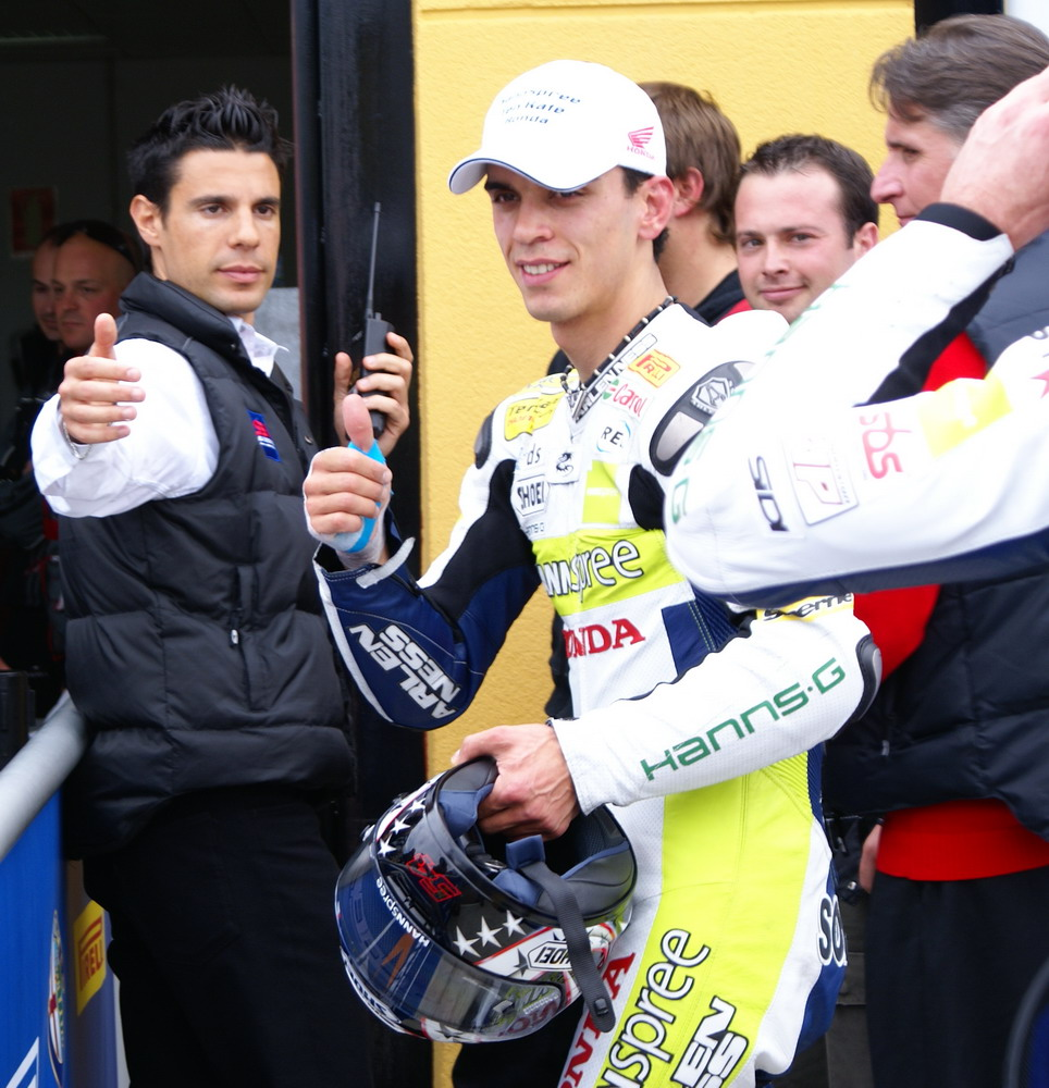 foto altı bilgisi 2007 Dünya Süper Sport Motosiklet Şampiyonası'nda Hannspree Ten Kate Honda takımıyla mücadele eden Kenan Sofuoğlu, Valencia Grand Prix'sindeki birinciliğinin ardından gazetecileri selamlıyor. Not:Fotoğrafın sahibi Menderes Özel, kamu mülkiyetine bırakmak üzere bana göndermiştir. Kullanıcı:Khutuck